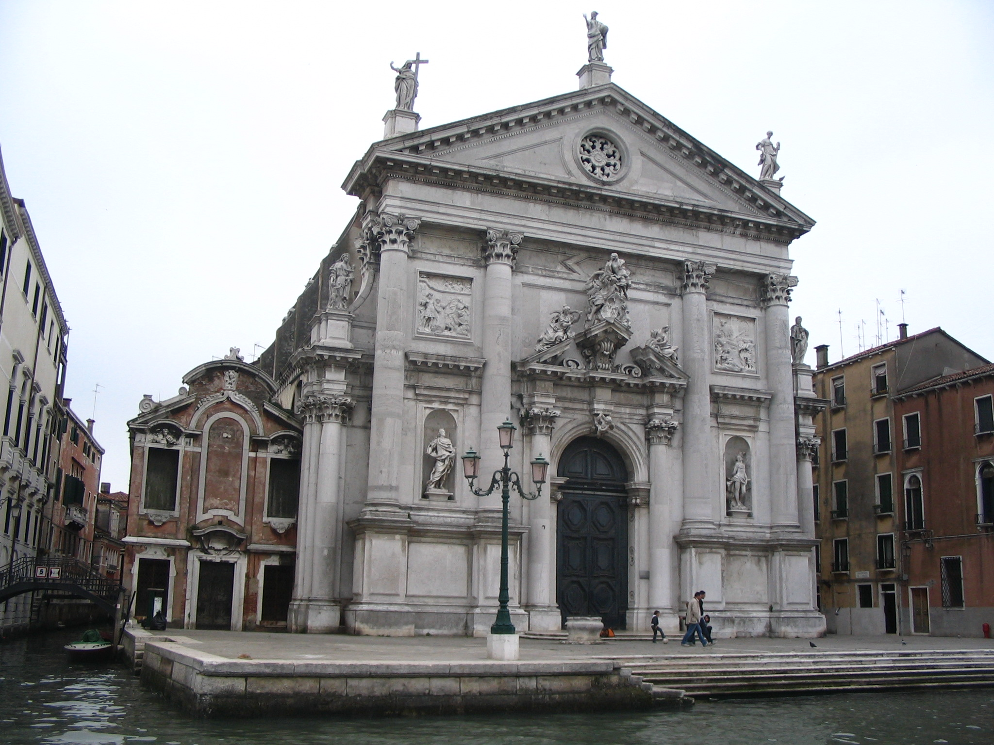 Eglise San Stae - Grand Canal (Venise)- et lbâtiment de la compagnie des tireurs et fileurs d'or tira battioro